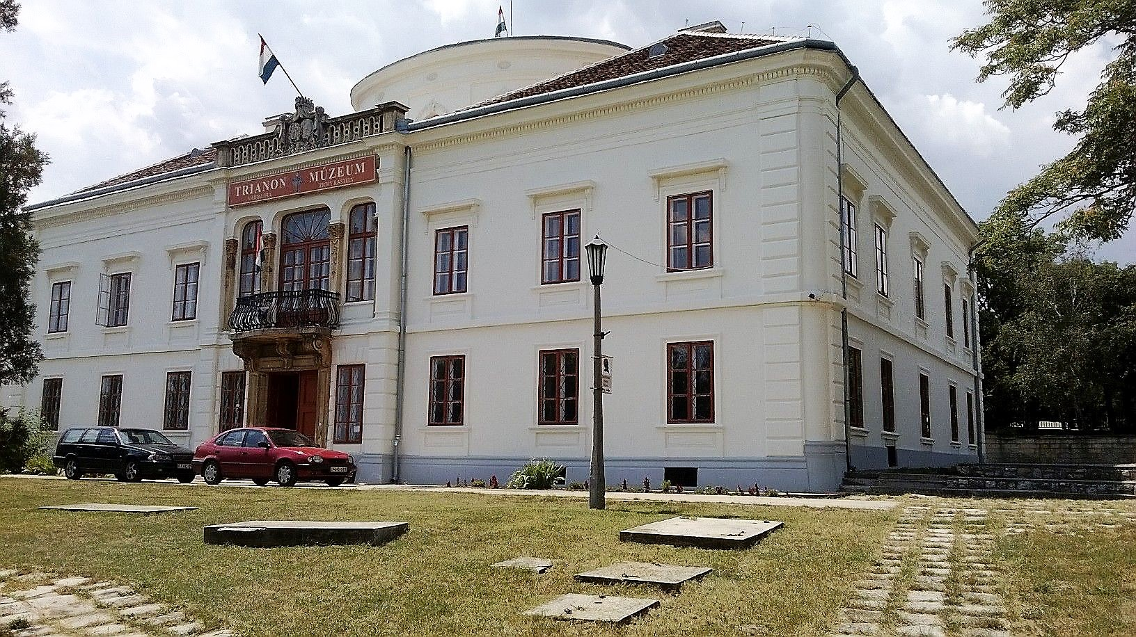 Trianon múzeum (Várpalota)